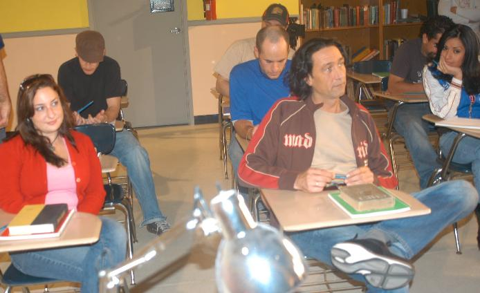 Minda, Steve Holmes, Lena Juliette On Set With Da Vinci Load From Hustler Video.